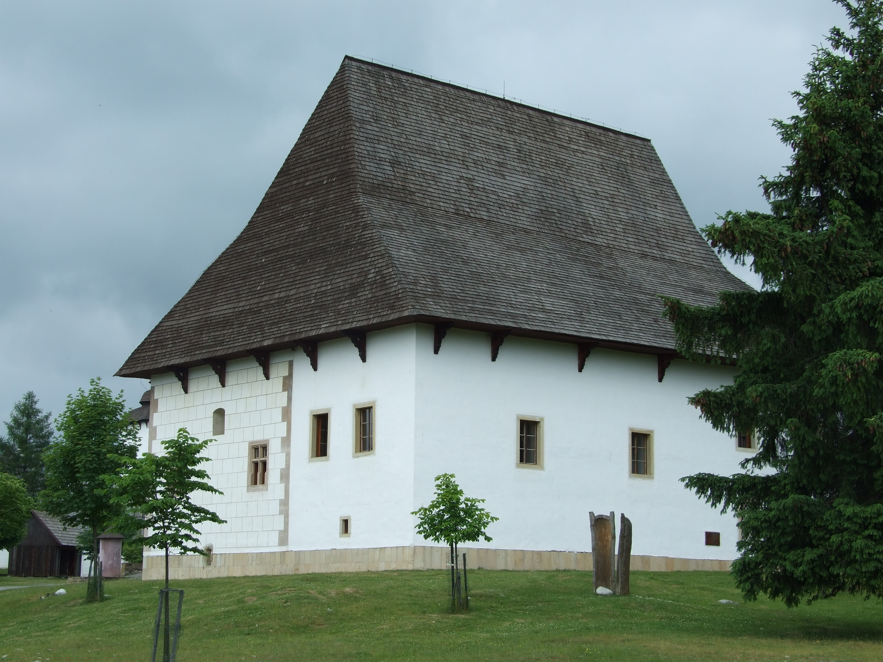 Múzeum liptovskej dediny v Pribyline sprístupnené verejnosti v roku 1991.